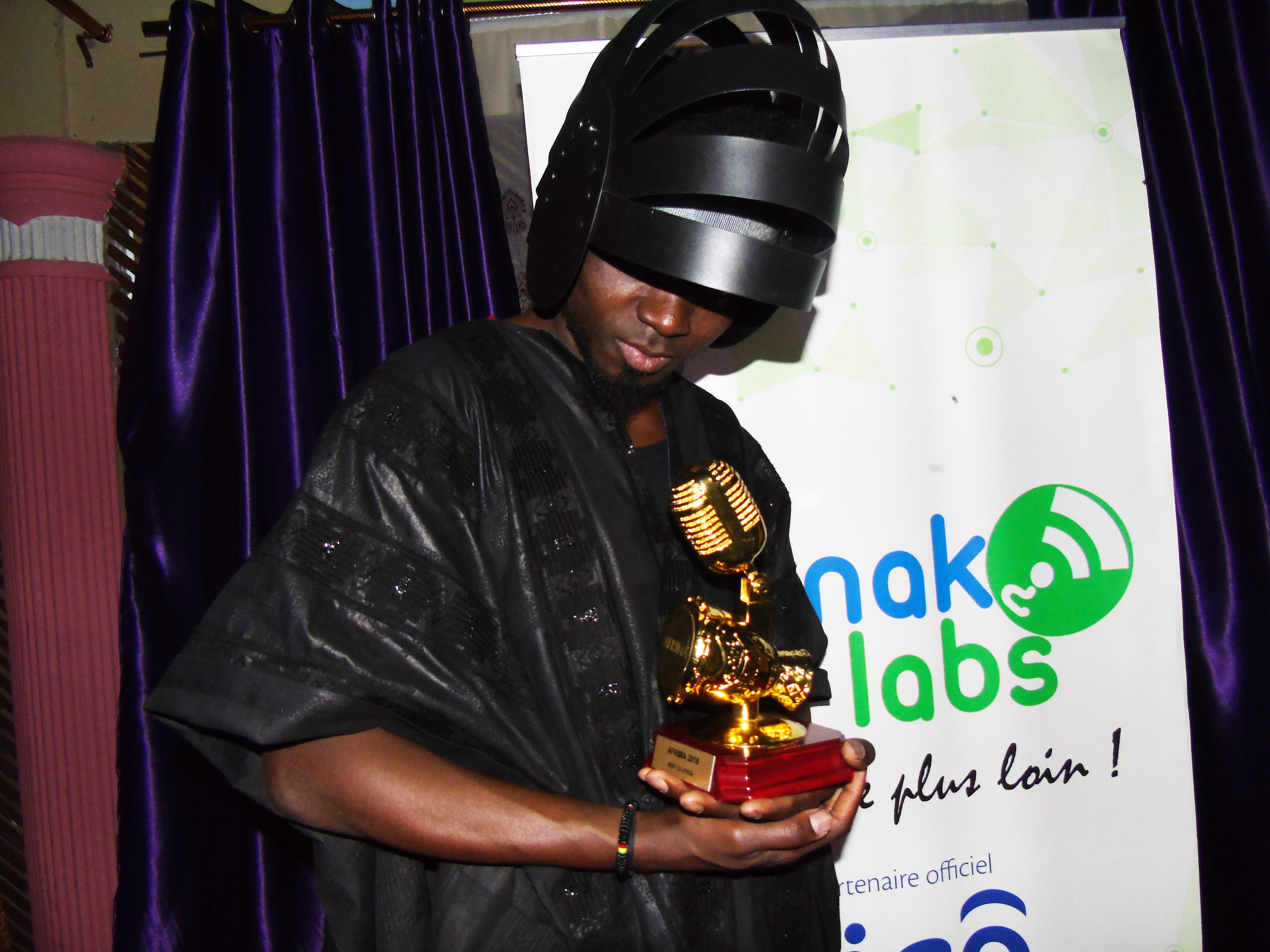 Caleb Rimtobaye , Afrotronix meilleurs DJ africain 2018. Cette photo est prise à WenakLabs lors du #Wanassa avec l'artiste